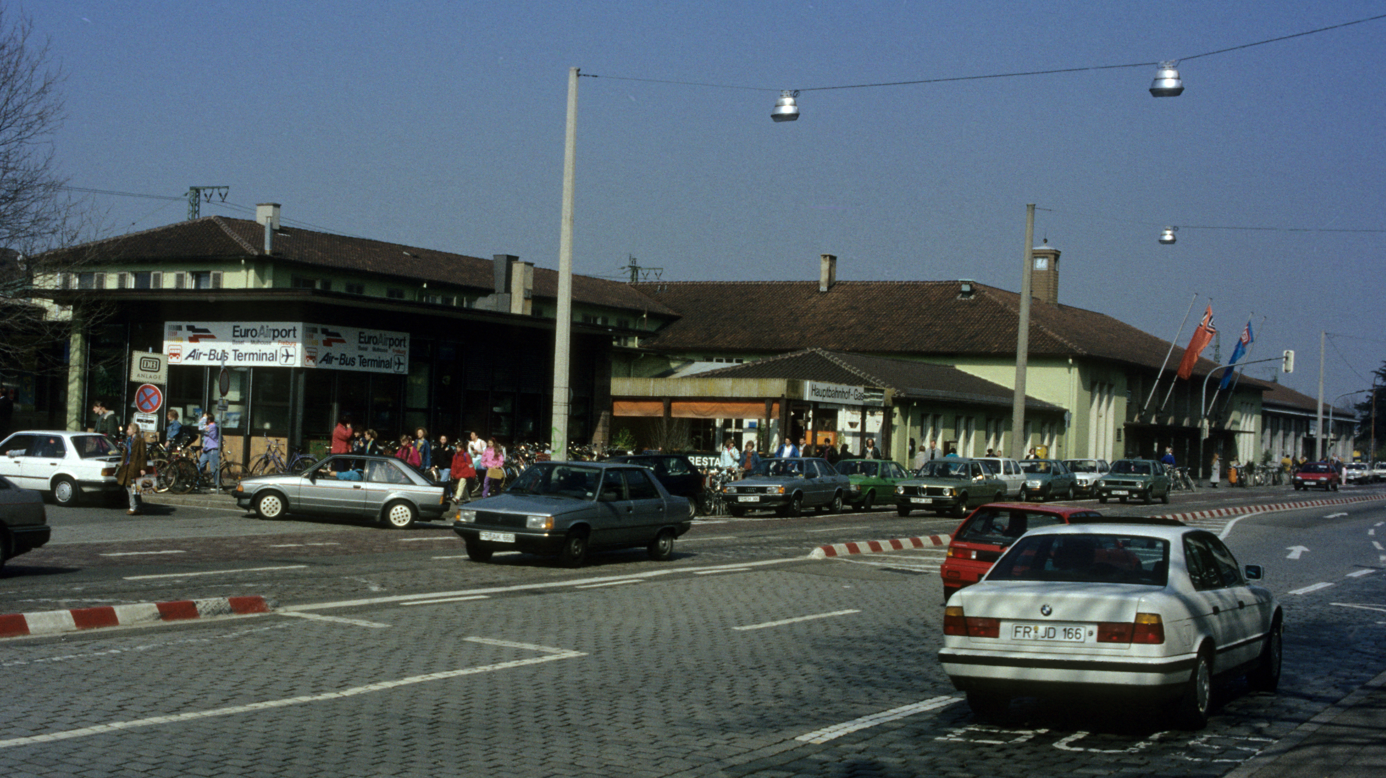 Ehemaliger Bahnhofsvorplatz mit altem Empfangsgebäude, inzwischen komplett abgerissen und durch den neuen HBF ersetzt